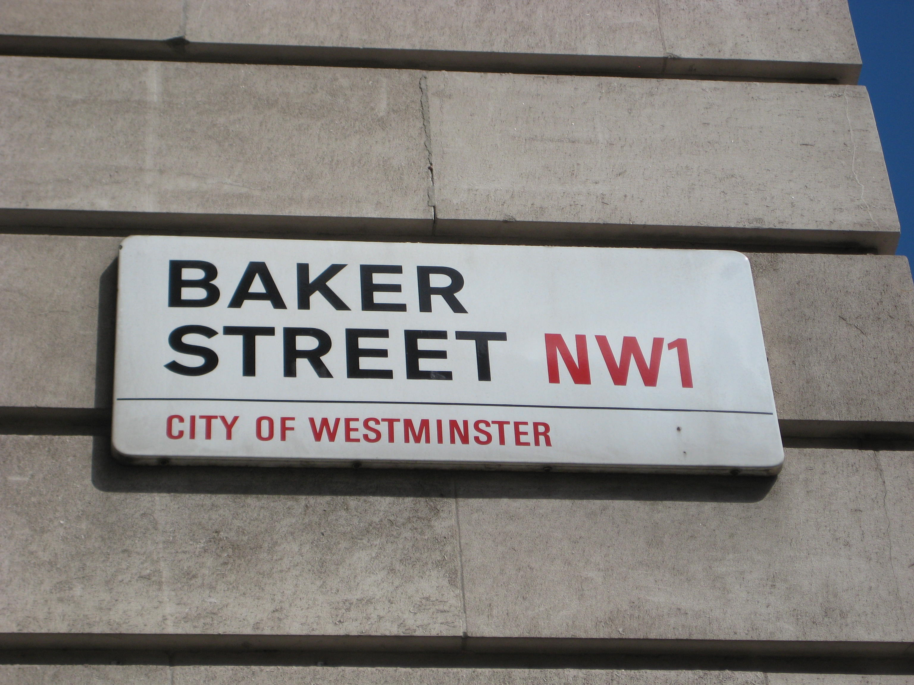 Straßenschild "BAKER STREET", City of Westminster (London, VK)